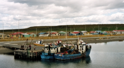 Der Hafen von Porvenir, Bahia Chilota.